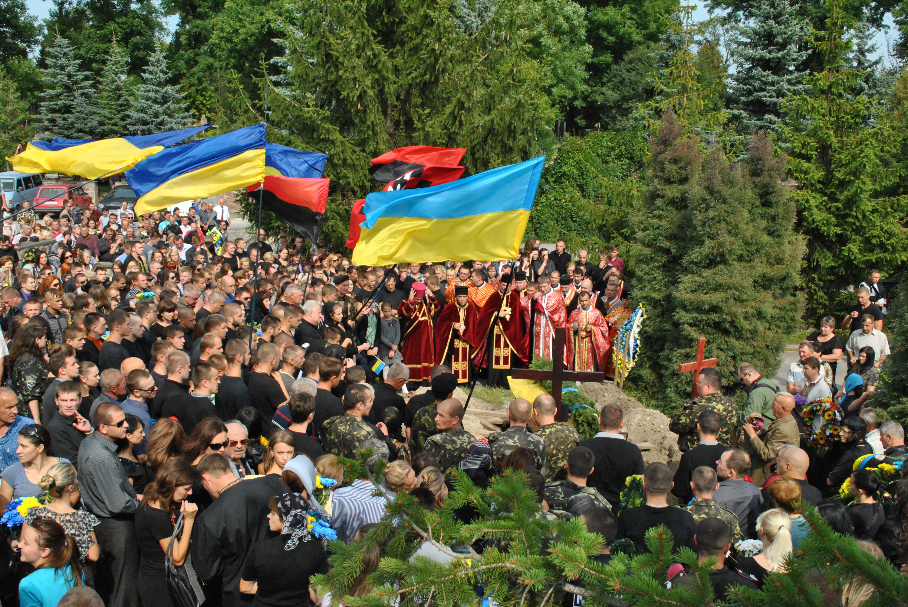 Похорон командира 2-го взводу 2-ї роти «Захід» 24-го батальйону територіальної оборони «Айдар», активного учасника Революції гідності Юркевича Андрія Михайловича на Микулинецькому цвинтарі Тернополя 11 вересня 2014 року.